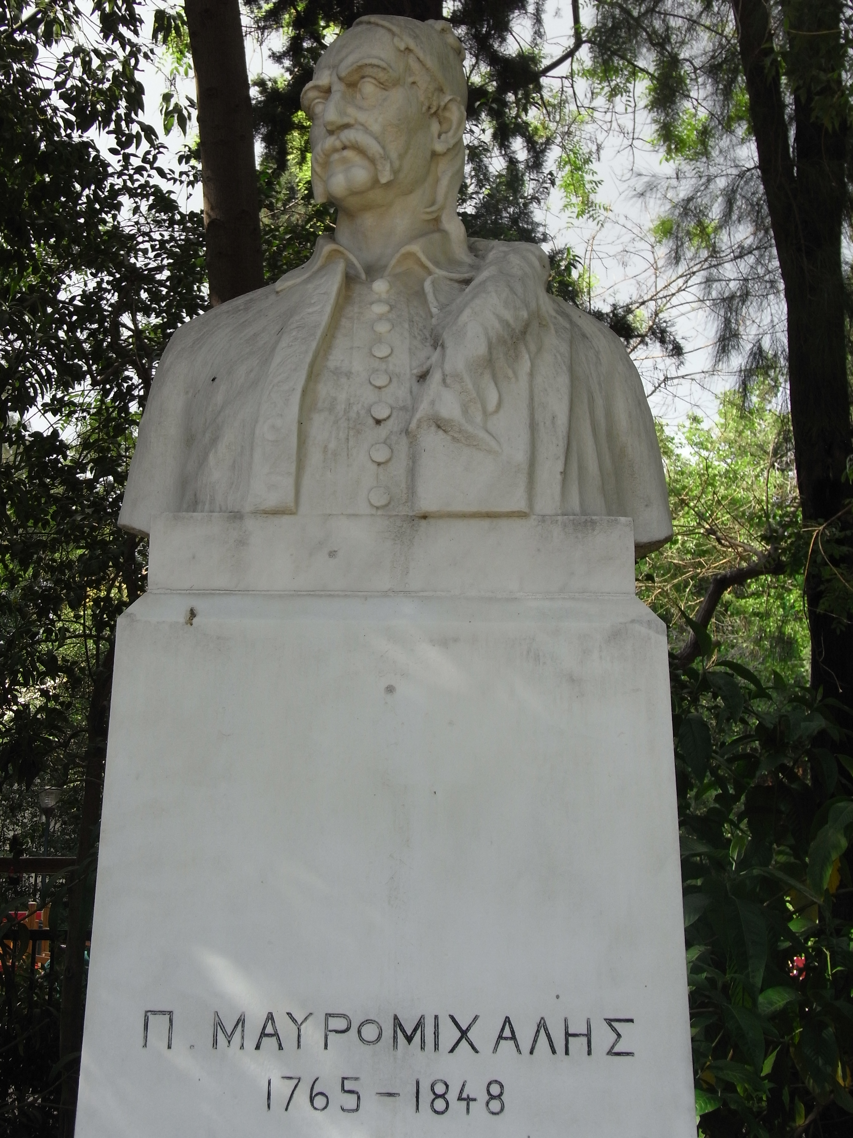 Les combattants de 21 (Αγωνιστές του 21)